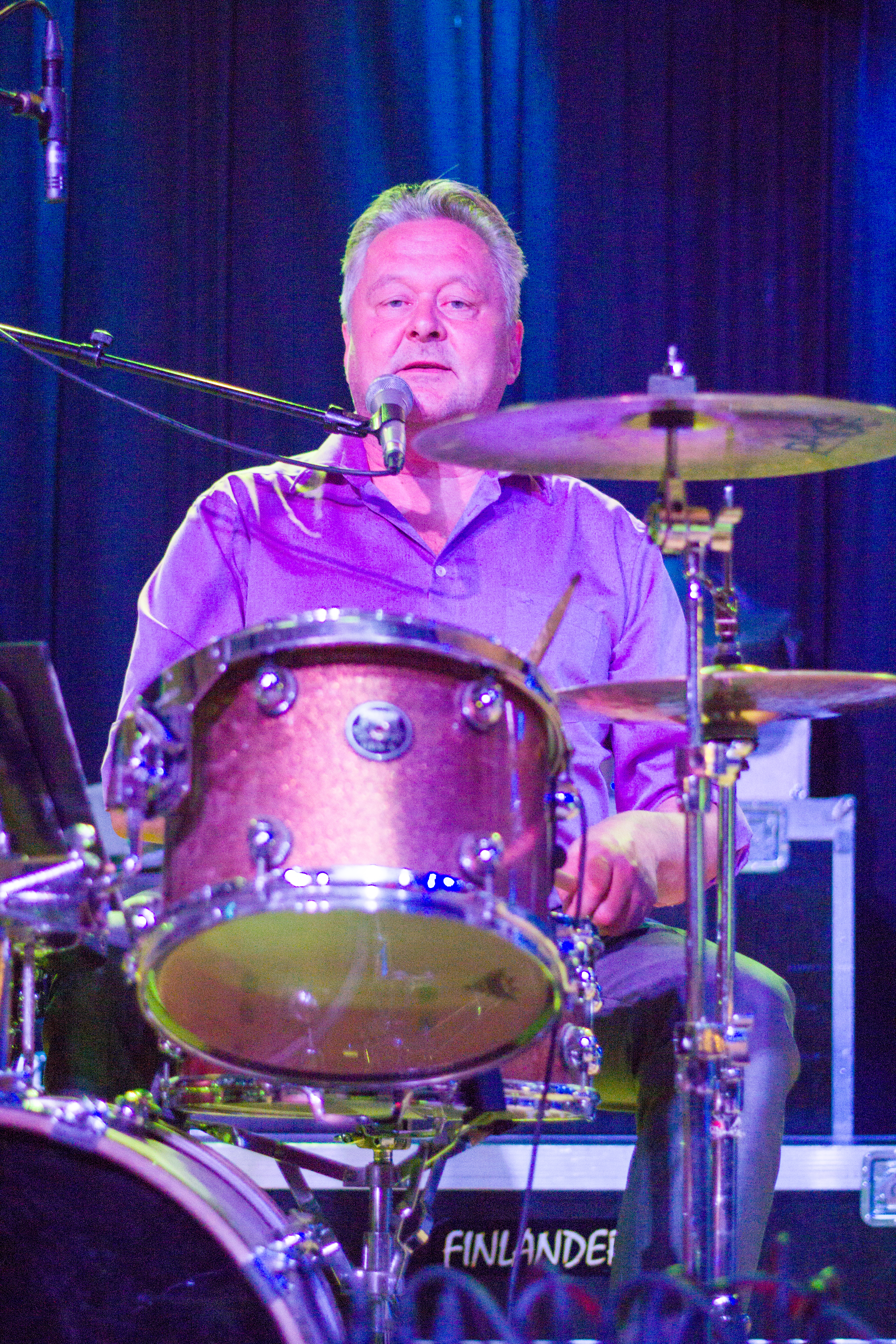 Jussi lammela suomalainen rumpali